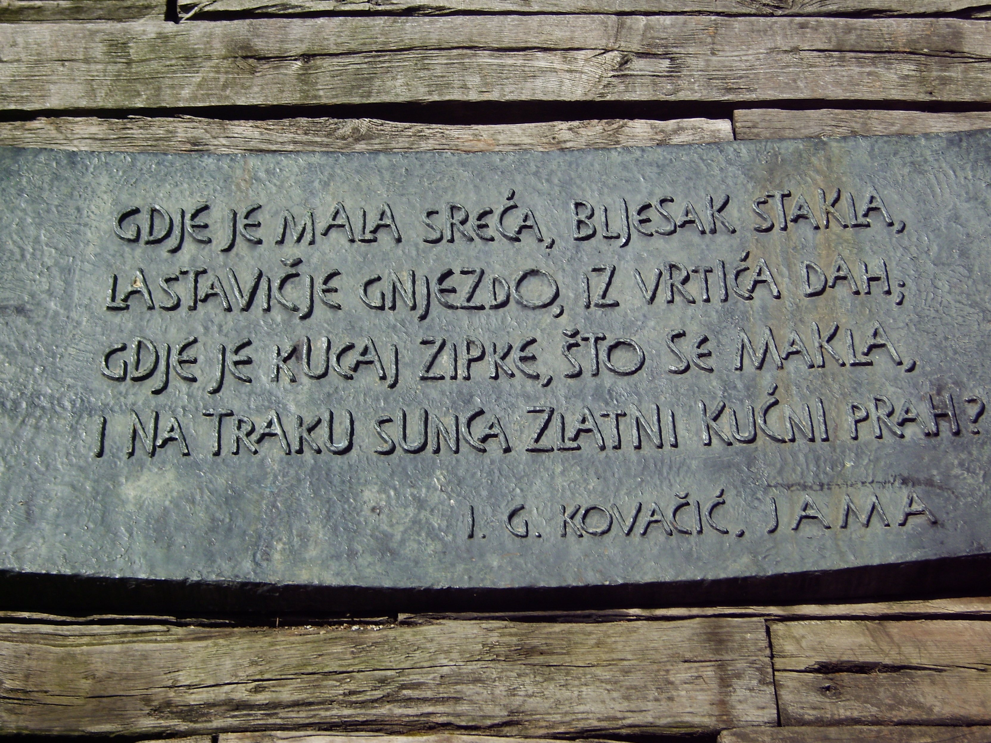 Tafel unten im Denkmal, Jasenovac